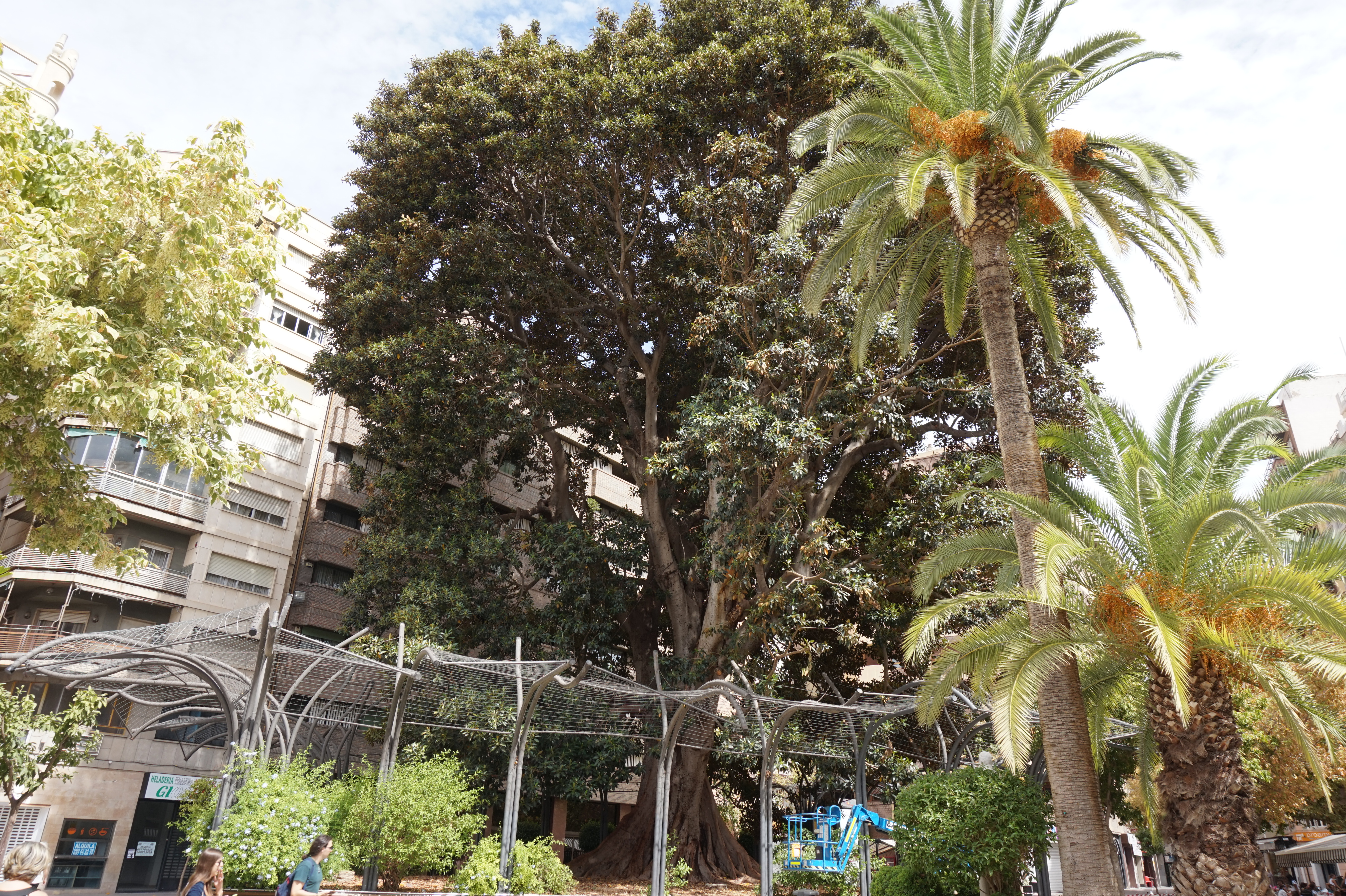 Ficus Centenario (Plaza Santo Domingo)